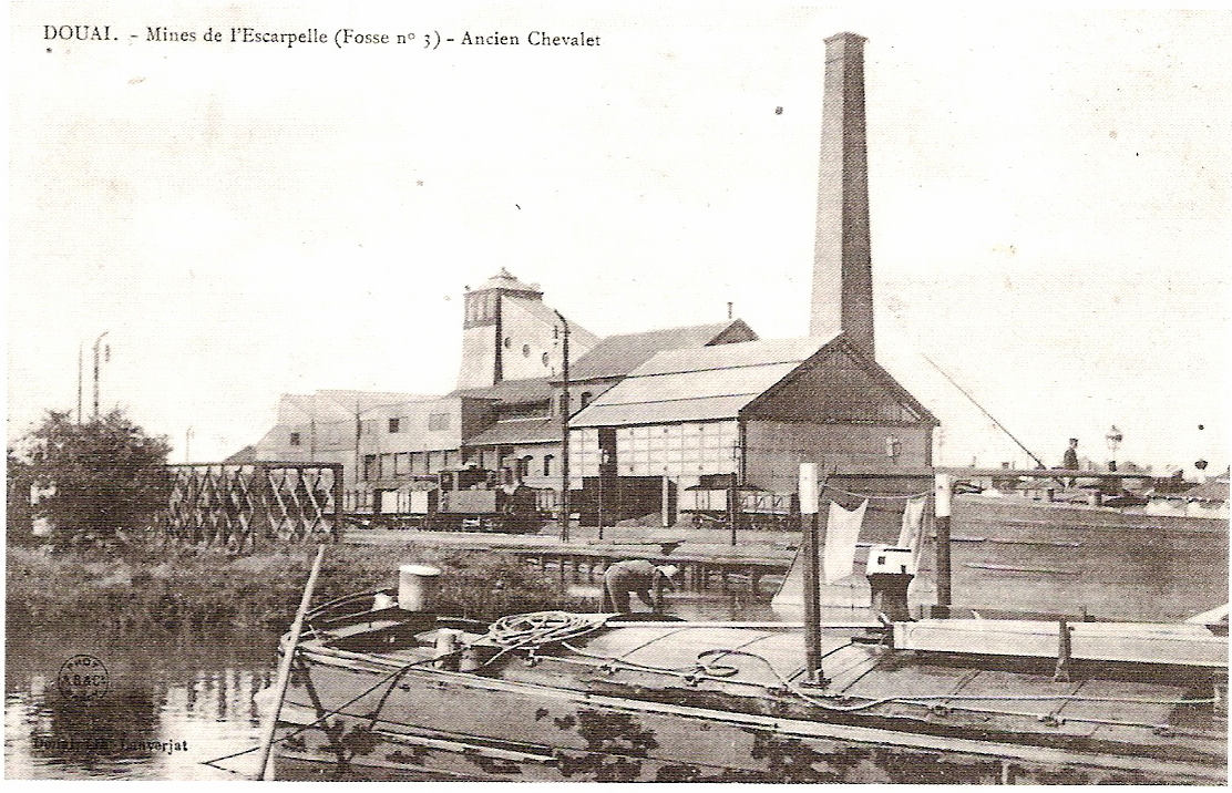 La Fosse n° 3 de la Compagnie des mines de l'Escarpelle était un charbonnage constitué d'un seul puits situé à Flers-en-Escrebieux, Nord, Nord-Pas-de-Calais, France.